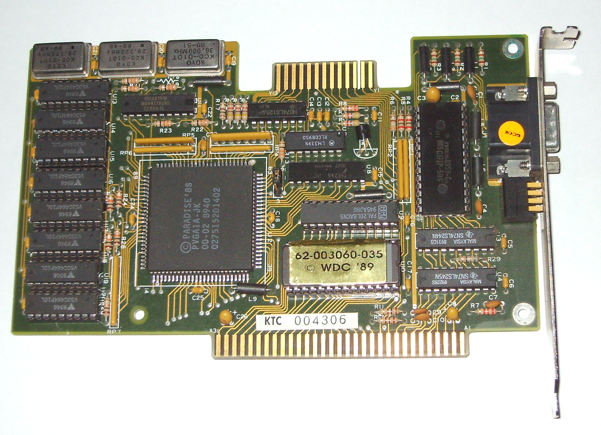 Paradise VGA Grafikkarte, ISA, 1 MB RAM, 1989, von 286er